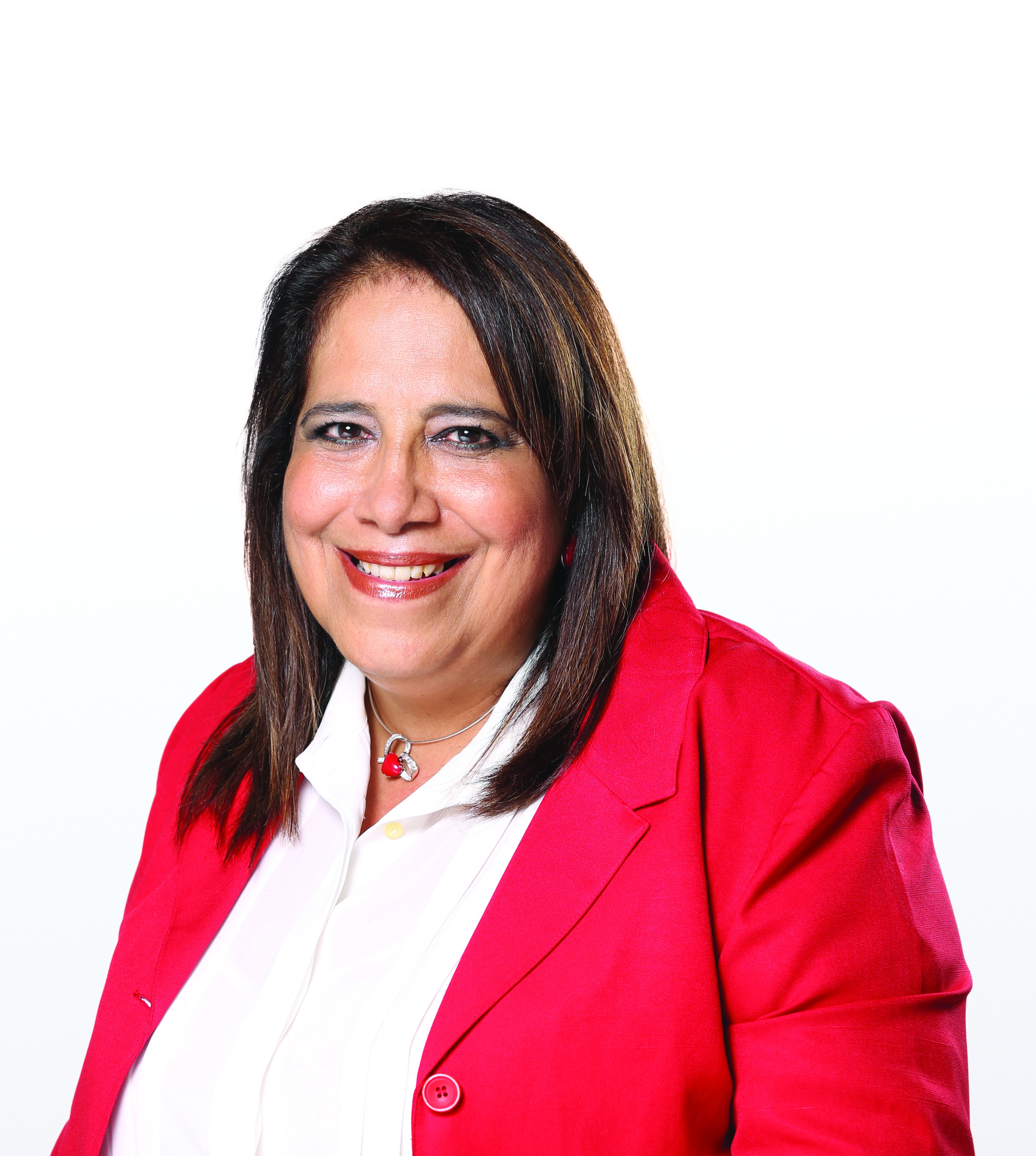 Nilda Díaz, fundadora del FMLN. Se incorporó a la lucha revolucionaria a los 17 años, fue comandante de guerrillera, participó en las negociaciones de paz y el 16 de enero de 1992, es firmante de los acuerdos de Paz. El Salvador.